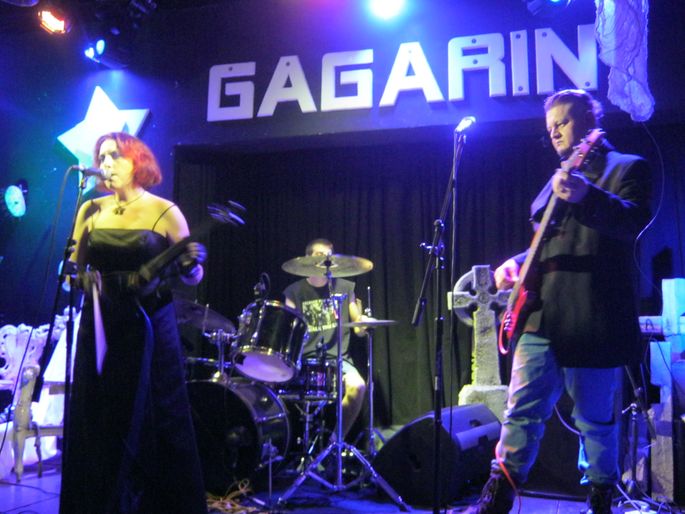 Fatum Aeternum 2015, Gagarin Club, Tel-Aviv